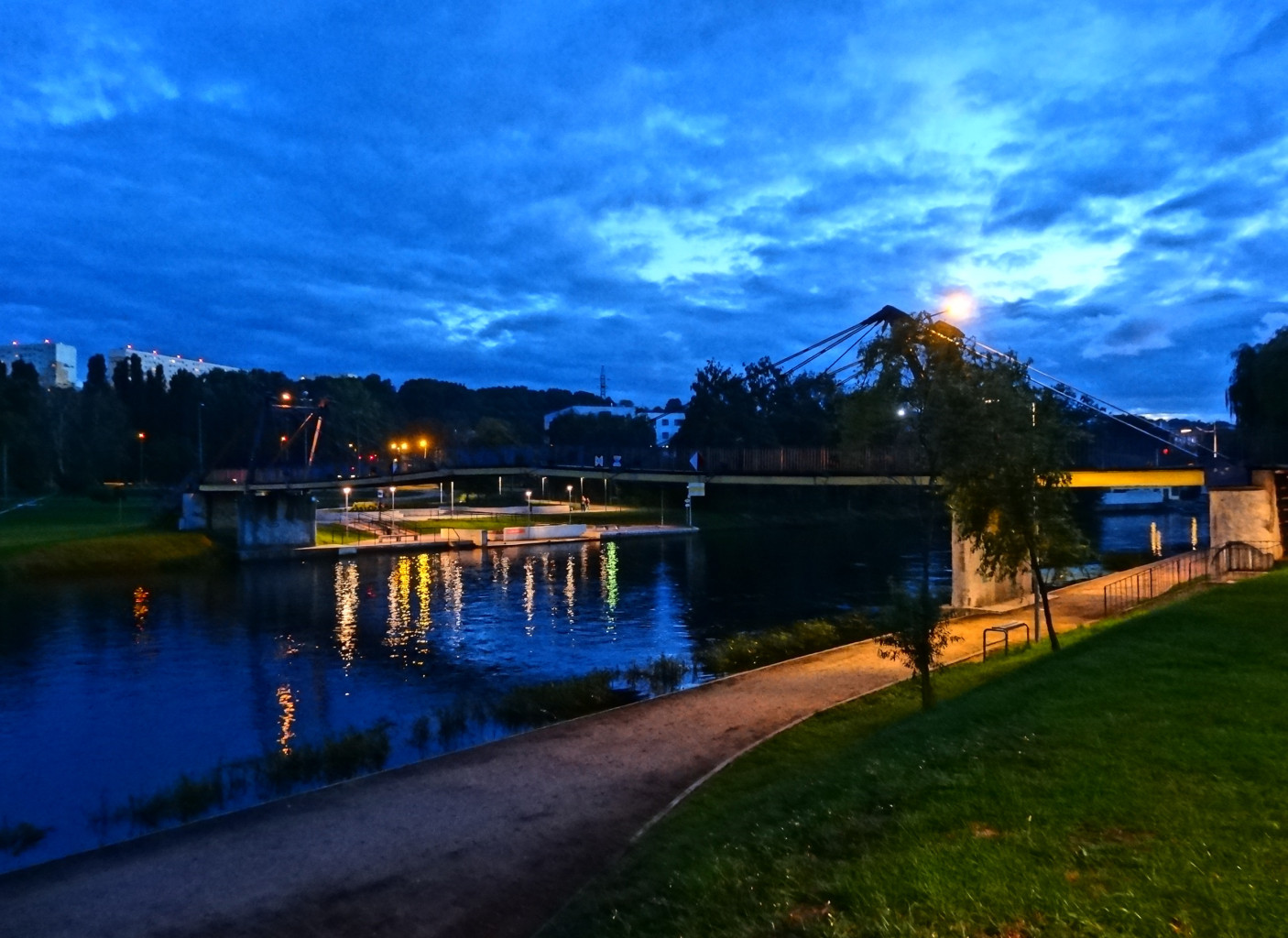 Kładka dla pieszych im. Esperanto przez Brdę w Bydgoszczy